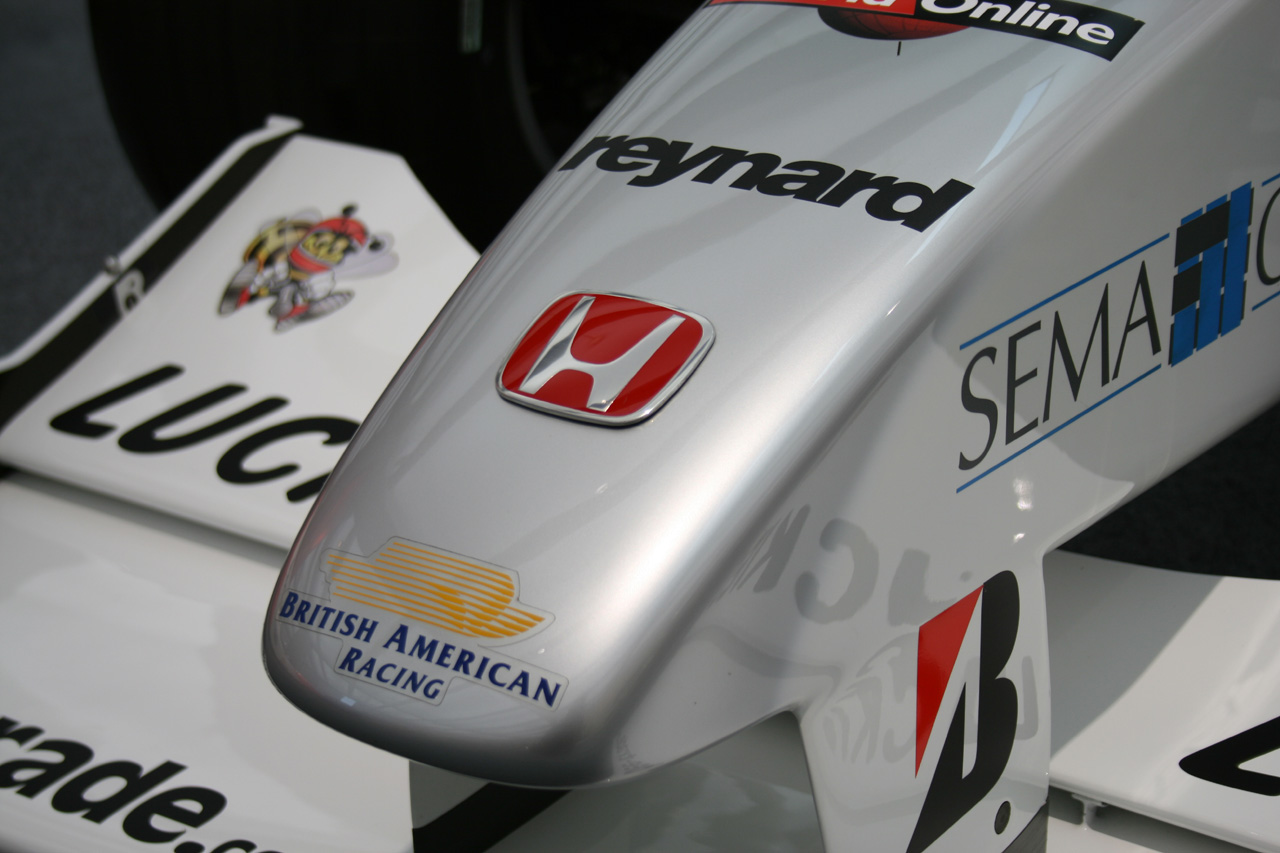 BAR 002 (#23 Ricardo Zonta)